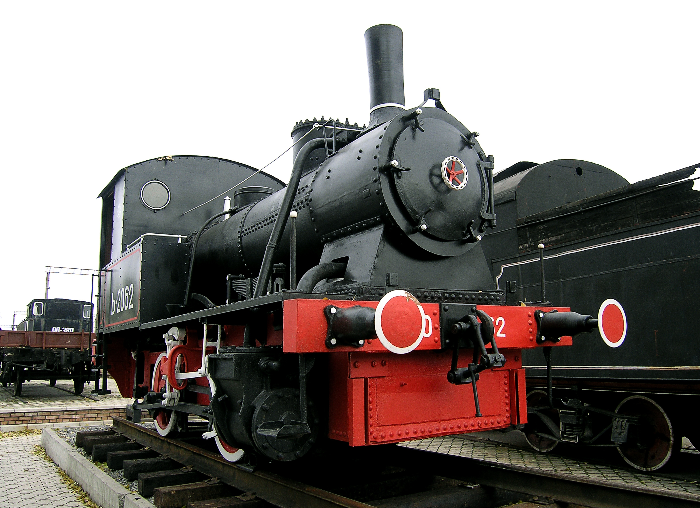 Донецкий музей паровозовЗнаменитая "Кукушка"(Танк-паровоз серии Ь, 0-2-0, заводской тип 137 Коломенского завода)